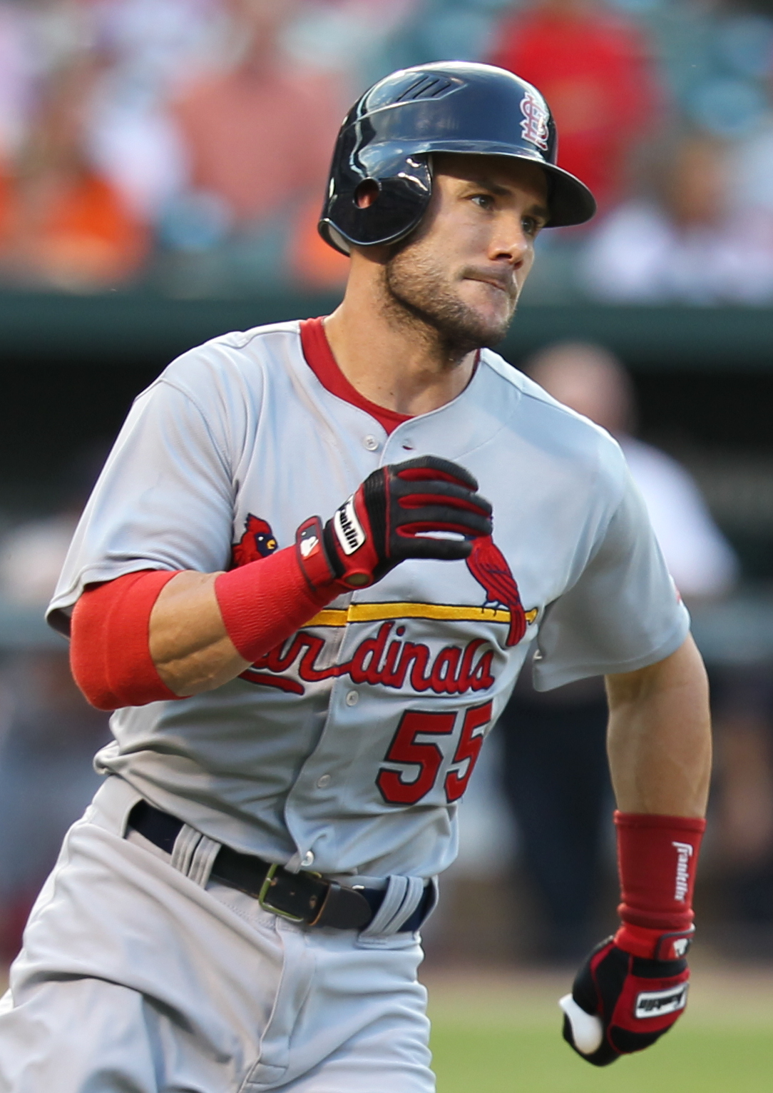 Skip Schumaker